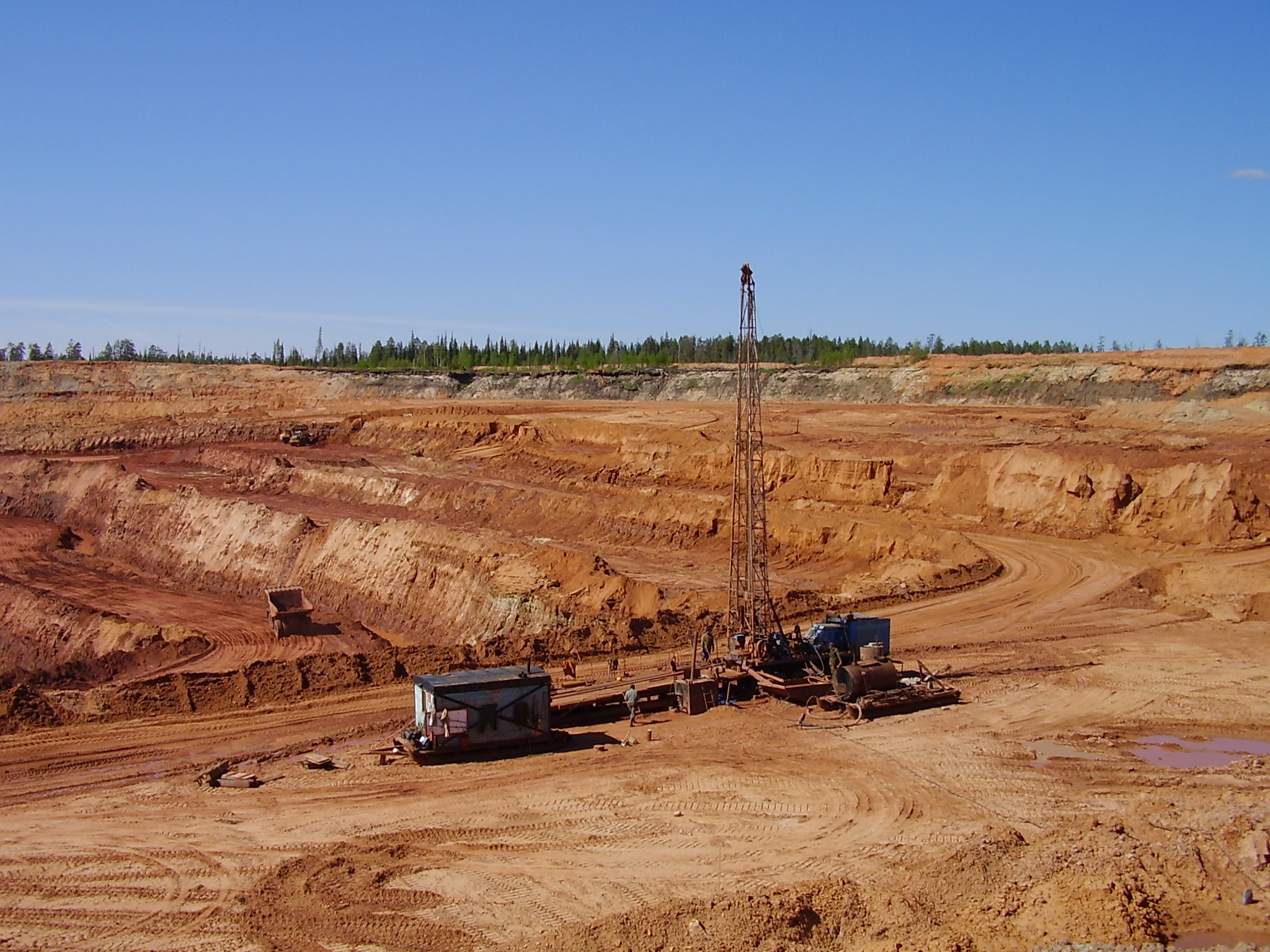 Месторождение алмазов им. М. В. Ломоносова, карьер кимберлитовой трубки Архангельская